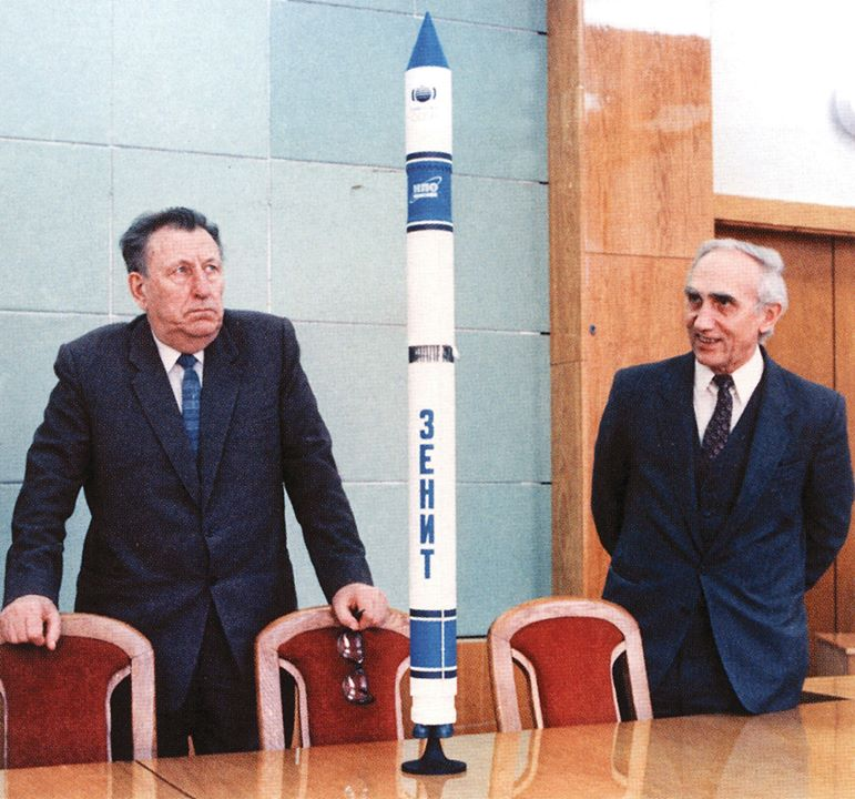 Генеральный конструктор КБЮжное В.Уткин и его первый заместитель Ю.Сметанин